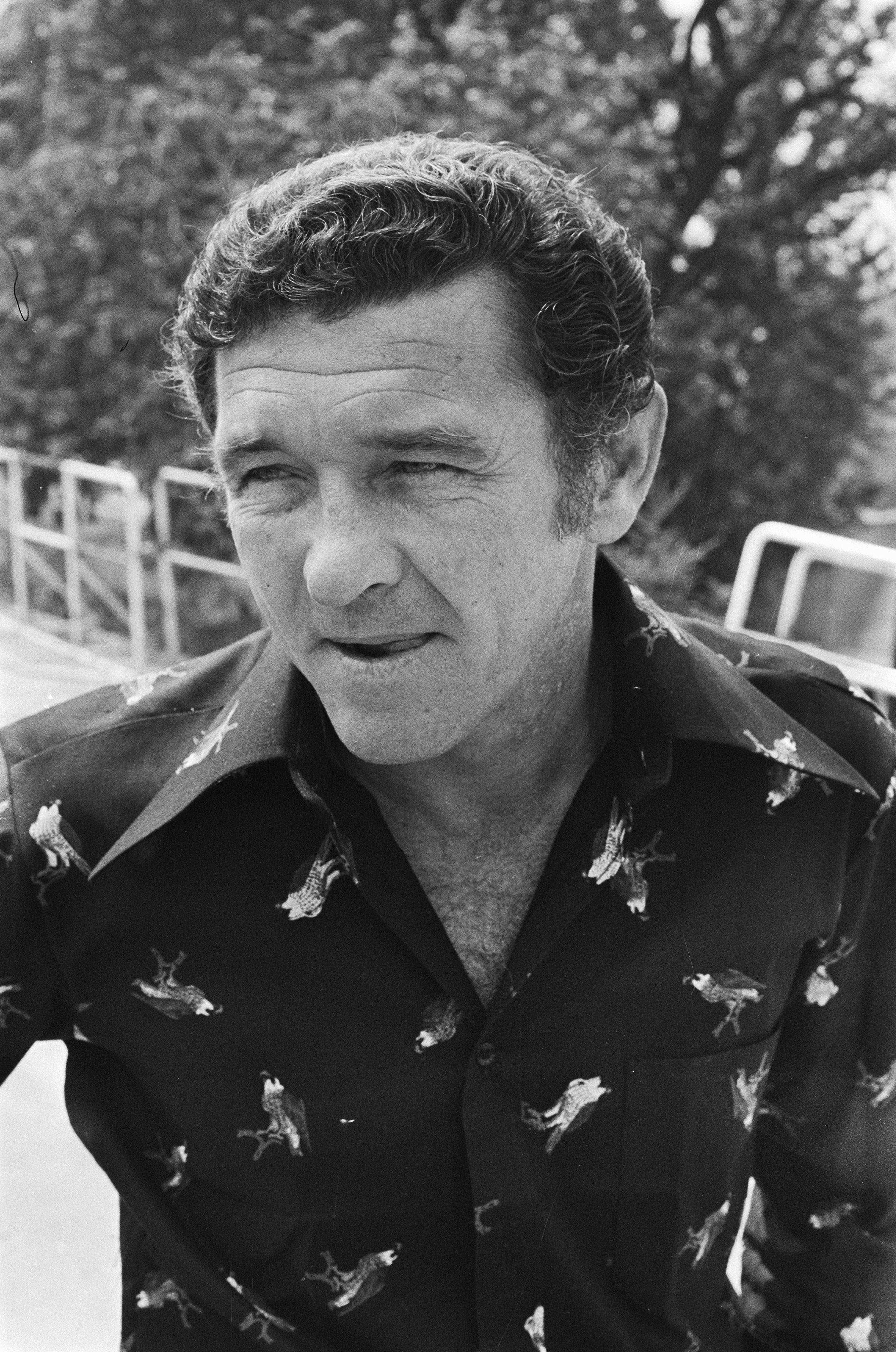 Collectie / Archief : Fotocollectie Anefo Reportage / Serie : [ onbekend ] Beschrijving : WK voetbal 1974; Argentijnen in trainingskamp, trainer Vladislao Cap (kop) Datum : 25 juni 1974 Trefwoorden : sport, trainers, trainingskampen, voetbal Fotograaf : Verhoeff, Bert / Anefo Auteursrechthebbende : Nationaal Archief Materiaalsoort : Negatief (zwart/wit) Nummer archiefinventaris : bekijk toegang 2.24.01.05 Bestanddeelnummer : 927-2802